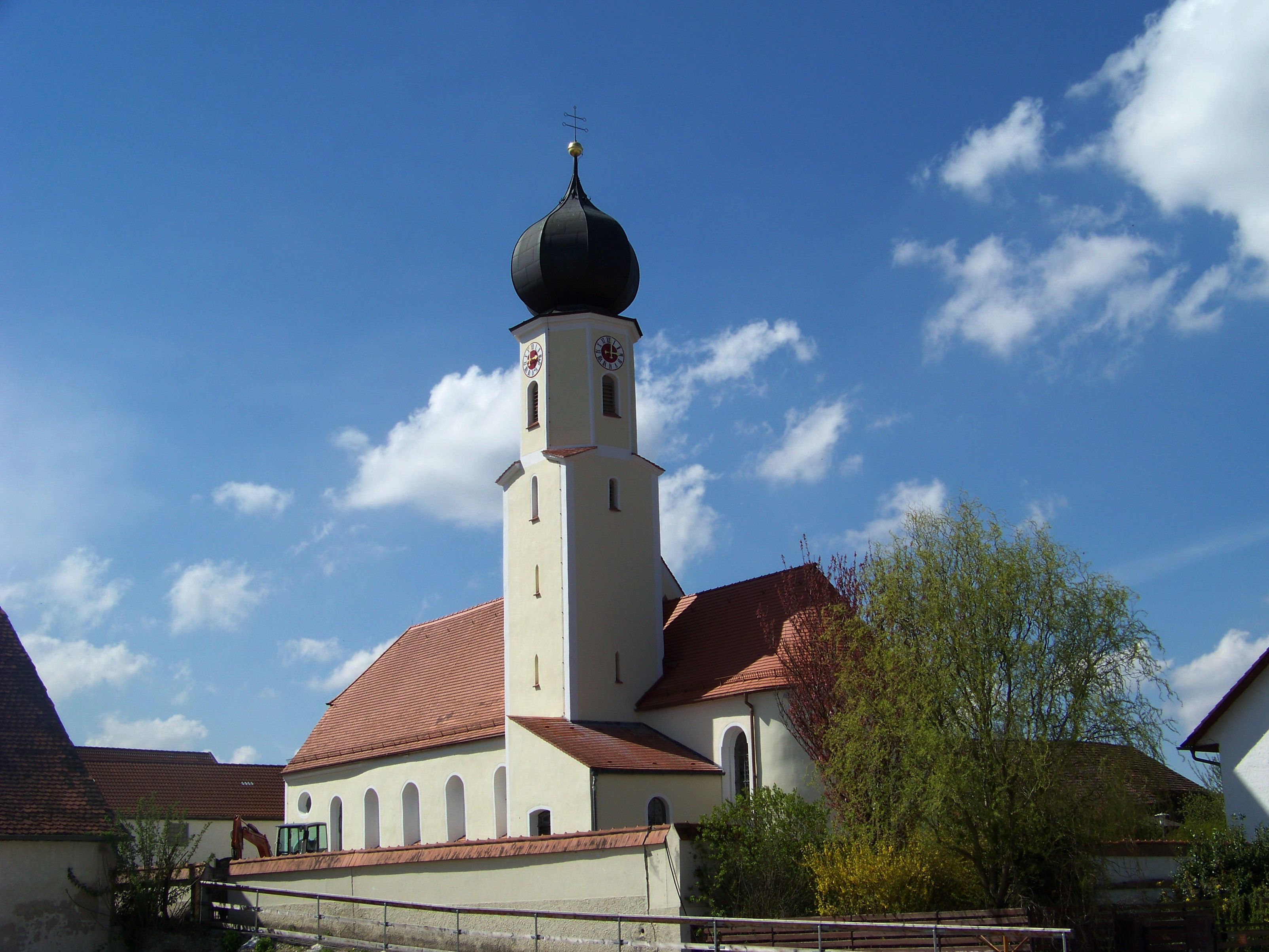 Dornwang. Pfarrstraße 2. Kath. Filialkirche St. Martin, Saalbau mit eingezogenem Chor und Südturm, Langhaus im Kern 12. Jh., Turmunterbau gotisch, Aufsatz und Kuppelhaube 17. Jh., Chor und Sakristei frühes 18. Jh. Langhauserweiterung 1908; mit Ausstattung.